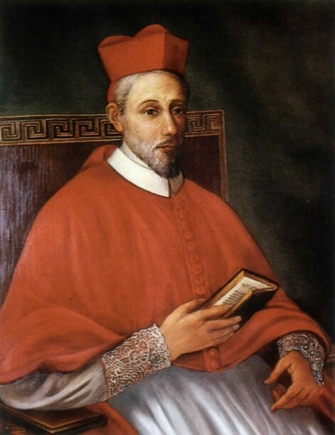 Le cardinal Barbarigo